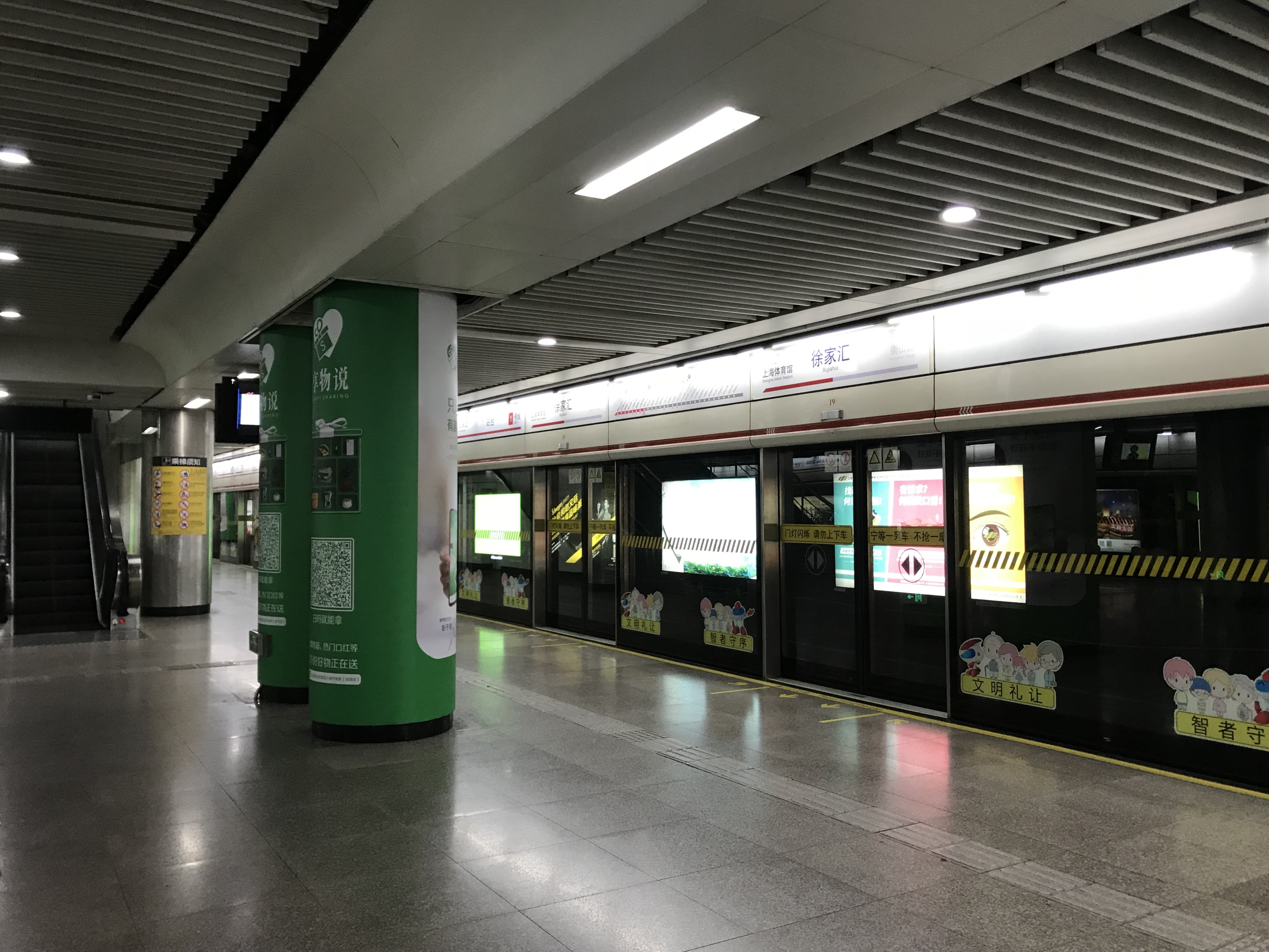 徐家匯駅(上海地下鉄1号線)のホーム